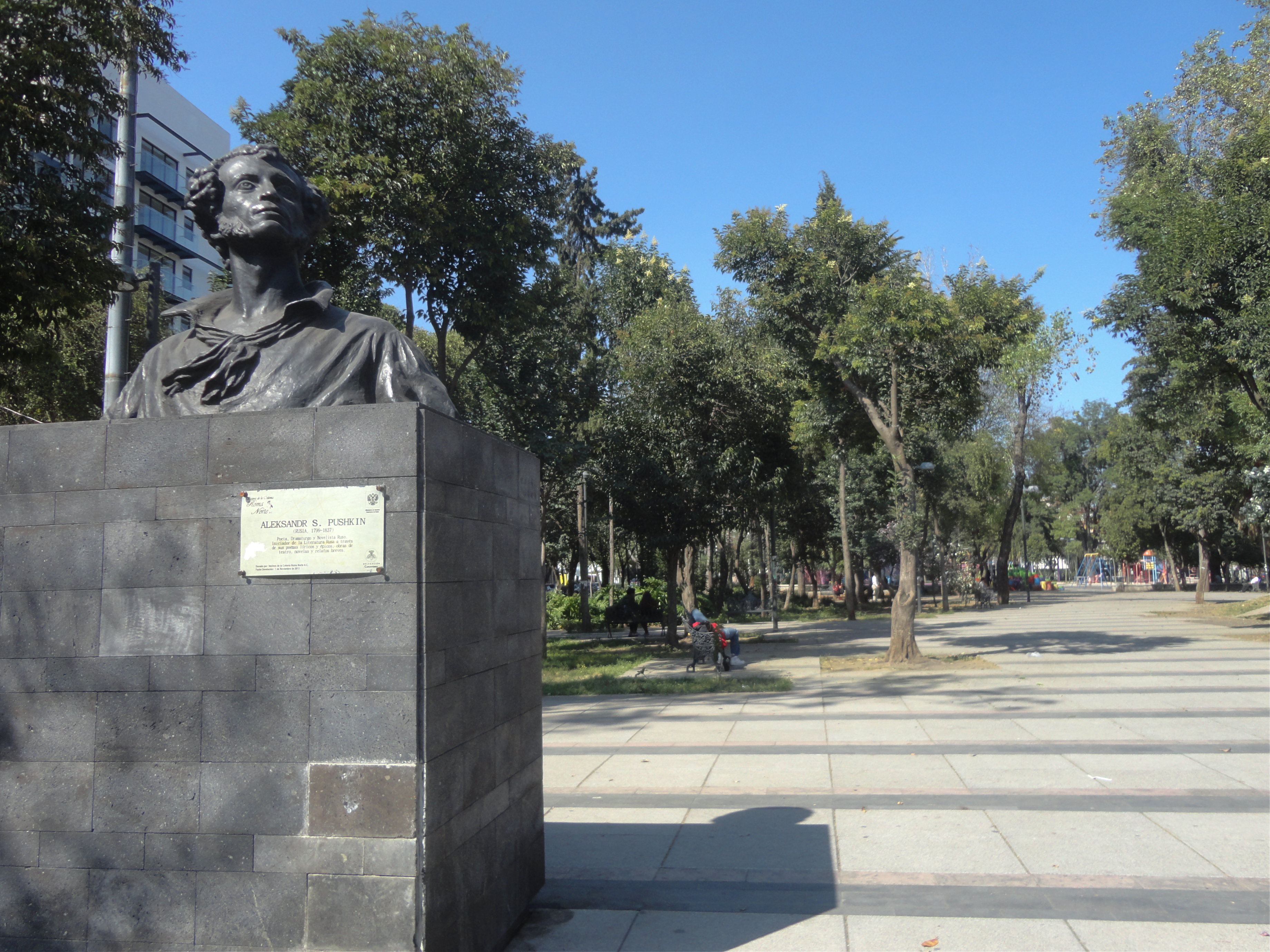 Jardín Pushkin, Colonia Roma, Ciudad de México, México.